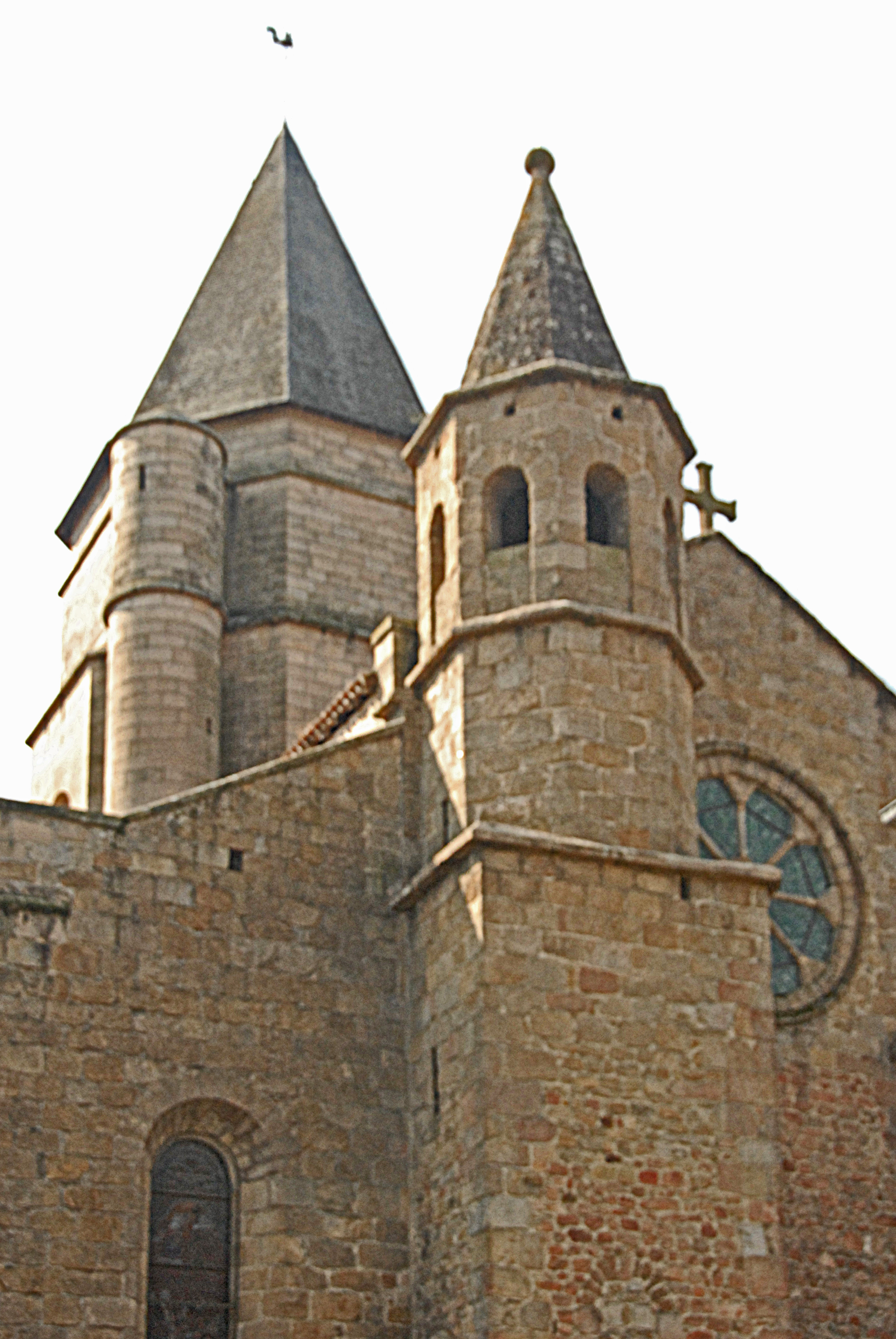 St-Junien, Querhaus, Vierungs- und Treppenturm